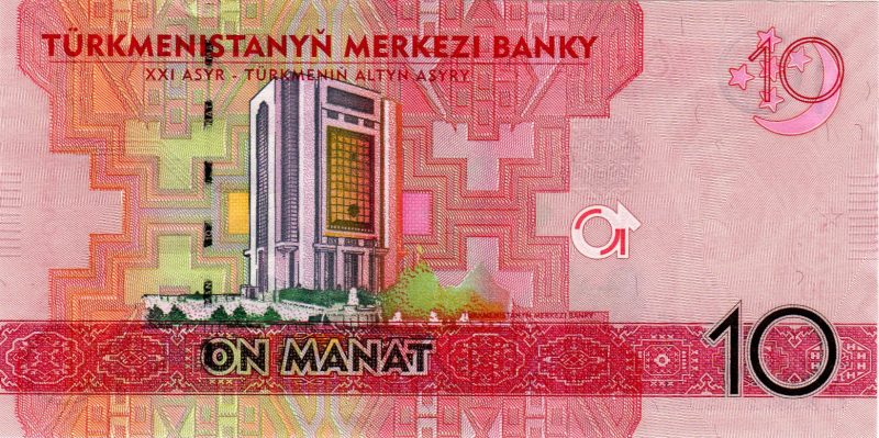 10 manat. Türkmenistan